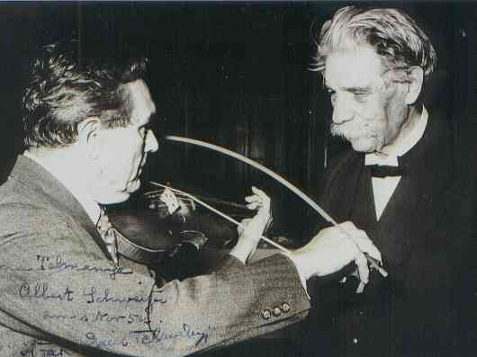 Telmányi demonstriert Schweitzer seinen Rundbogen (VEGA Bach Bow)